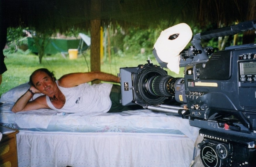 Georges Brossard au Venezuela pour la série Insectia en 1998. Georges Brossard, né en 1940 à La Prairie au Québec (Canada),fils de Georges-Henri Brossard, fondateur de la ville de Brossard , est un entomologiste et fondateur de l'Insectarium de Montréal.